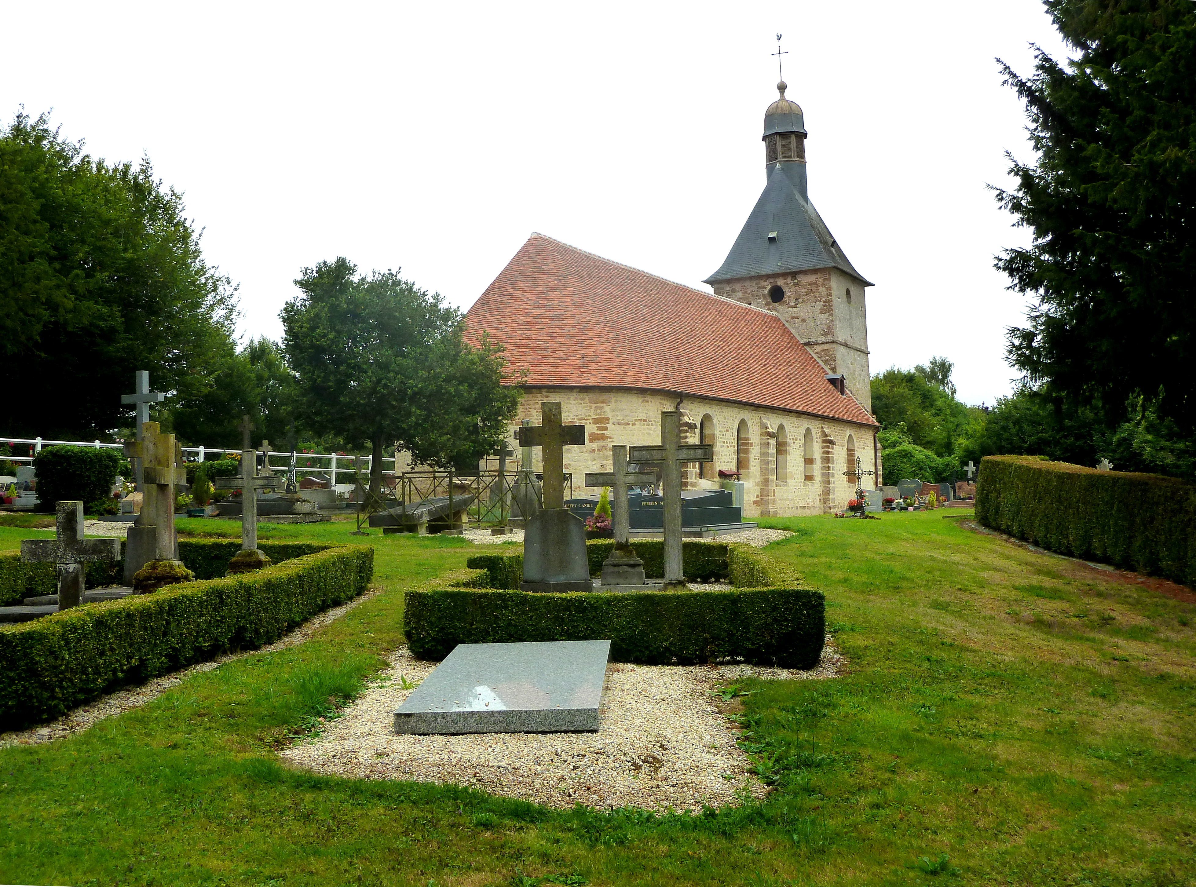 Aubry-le-Panthou P1060711 - l'église et le cimetière